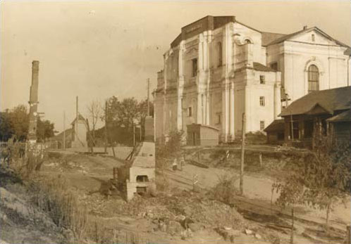 Беларуская (тарашкевіца): Бялынічы (Białyničy), пляц Рынак (plac Rynak). Касьцёл Унебаўзяцьця Найсьвяцейшай Панны Марыі і кляштар кармэлітаў